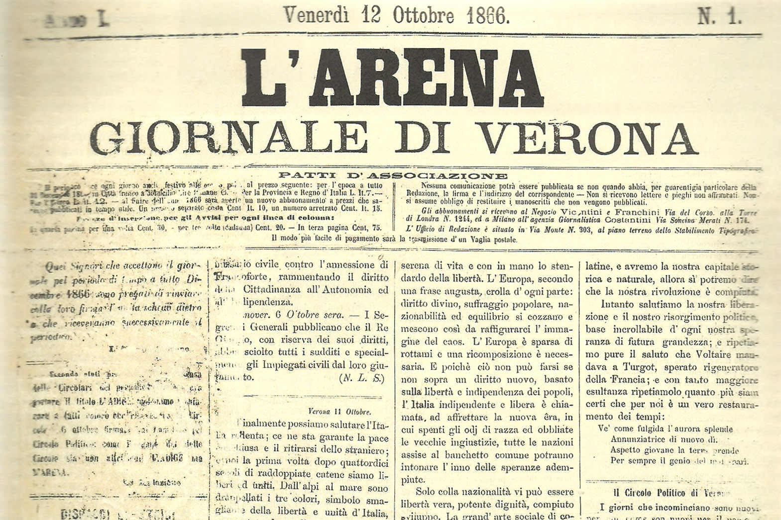 Prima pagina del primo numero del giornale l'Arena di Verona - versione ritagliata